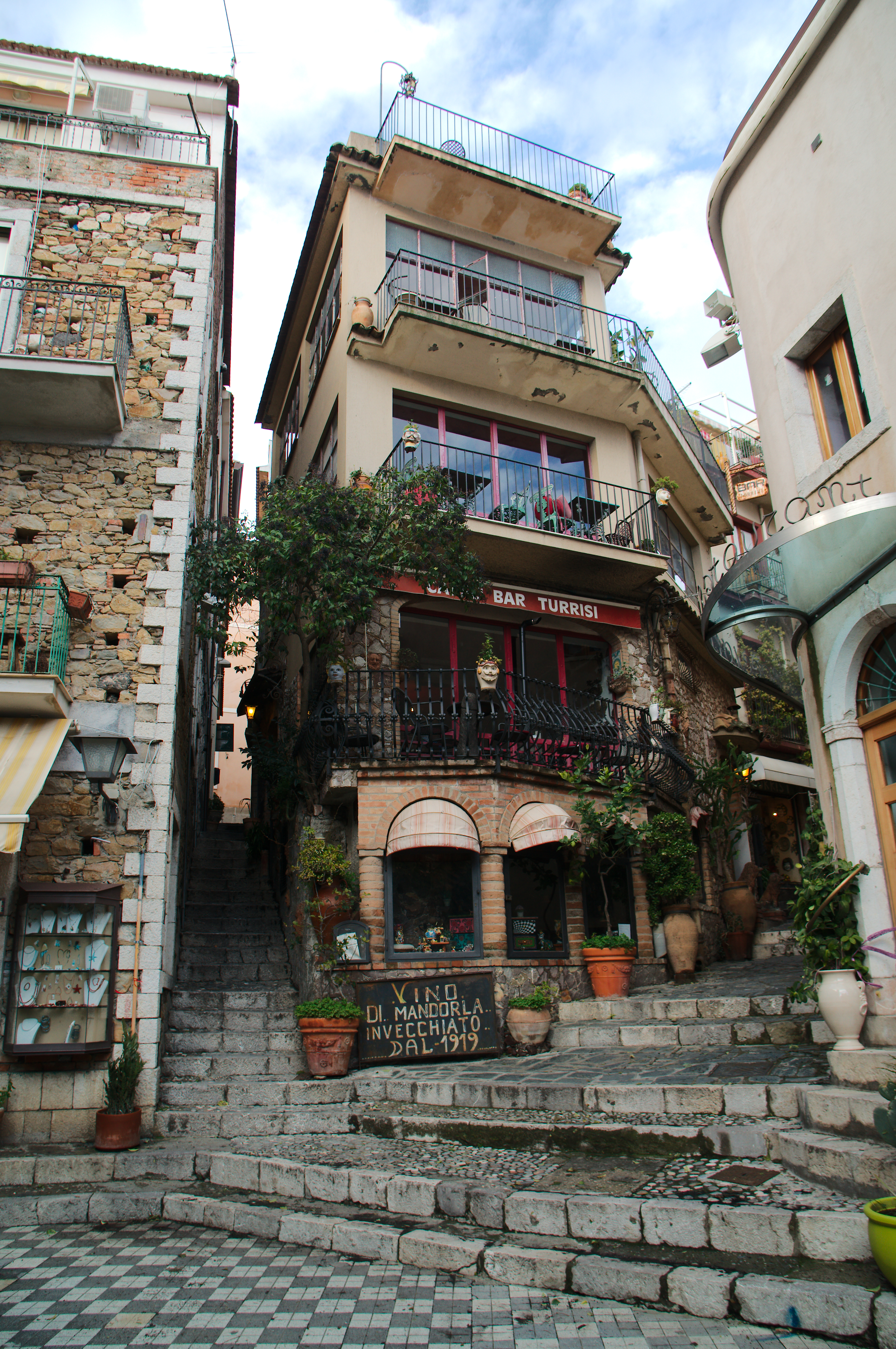 Taormina